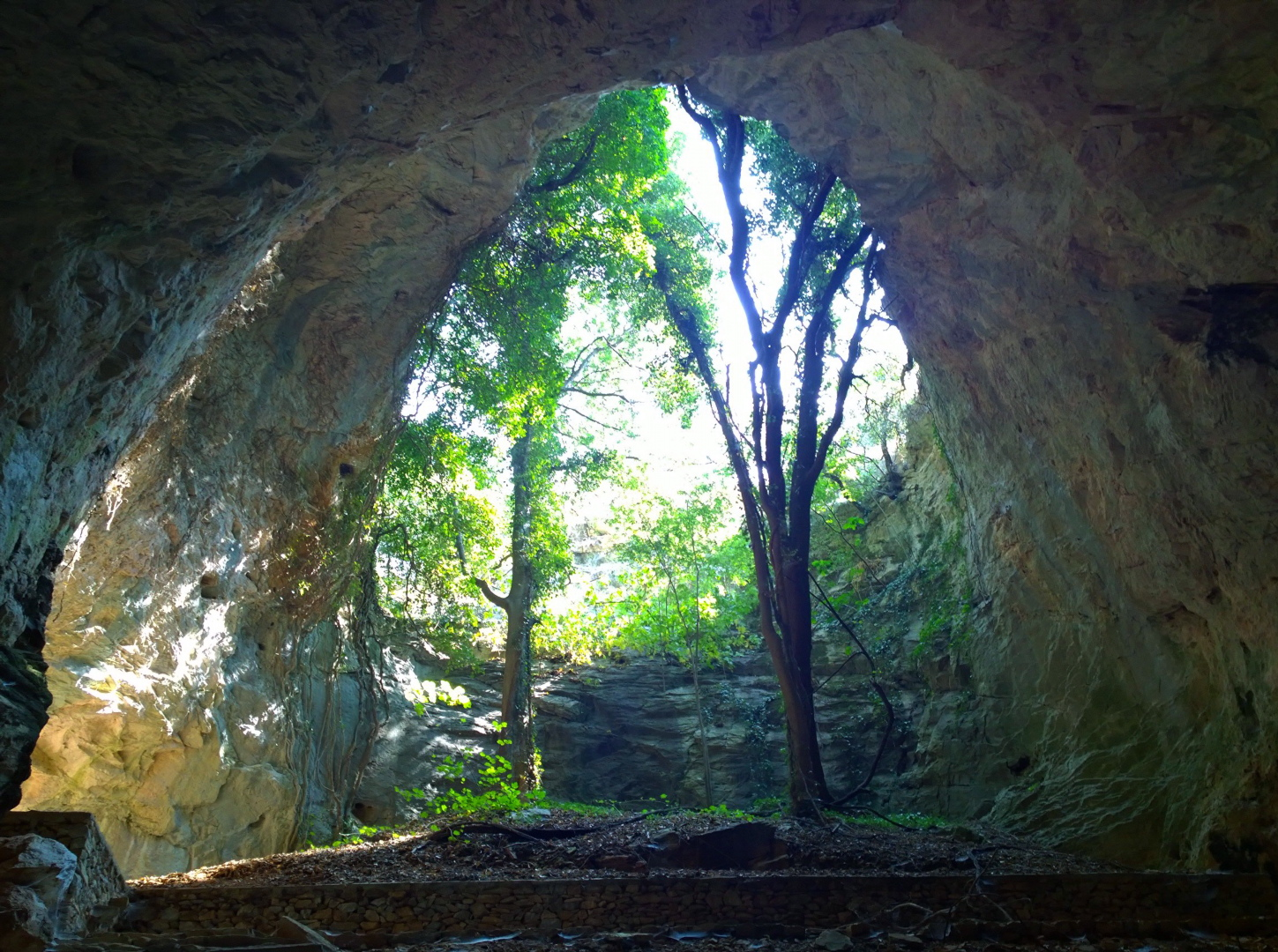 «Σπήλαιο Αγγίτη»